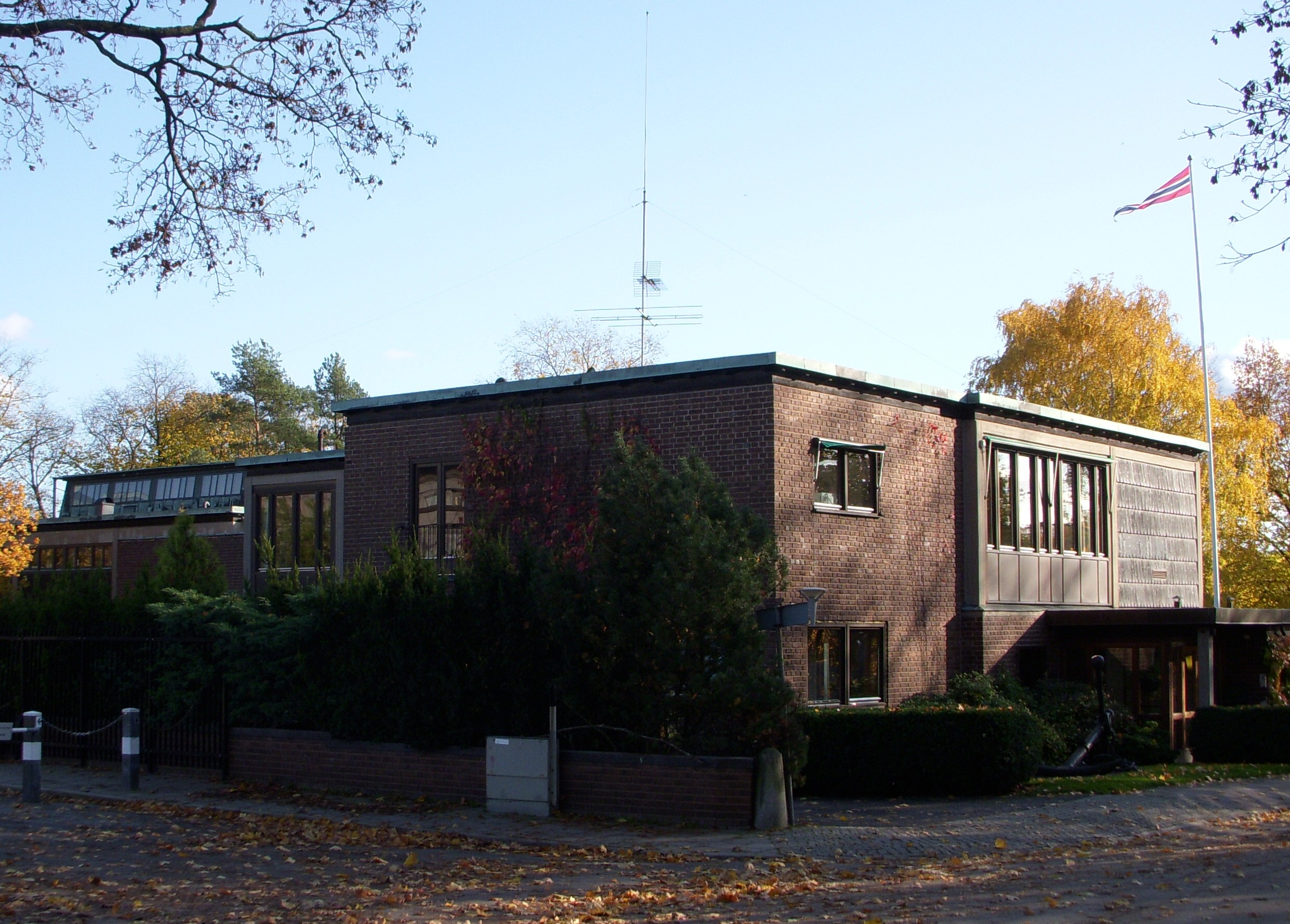 Norges ambassad i Stockholm